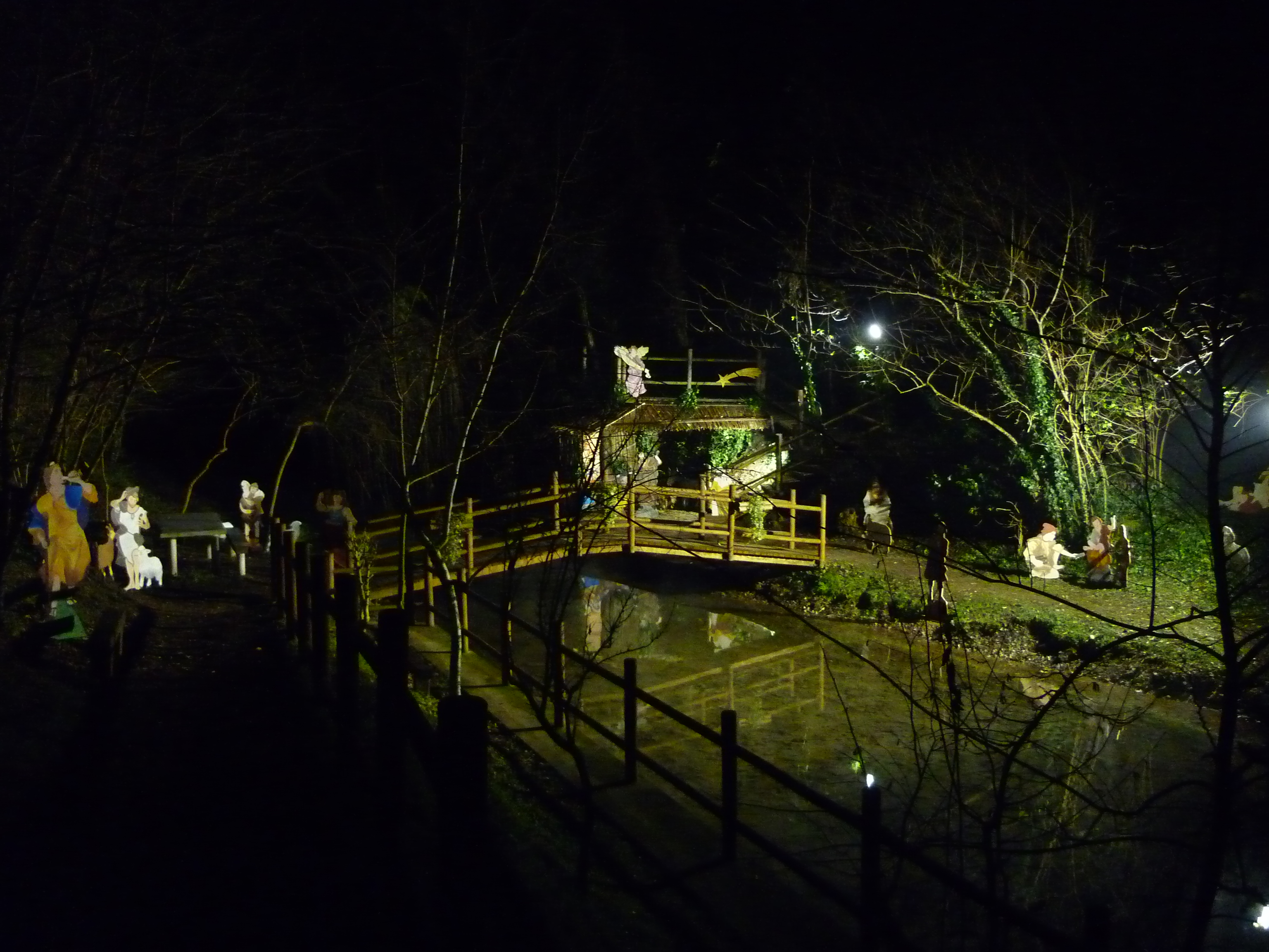 Il tradizionale presepe sul fontanile a Castellazzo de' Stampi, frazione di Corbetta (MI) - Italy